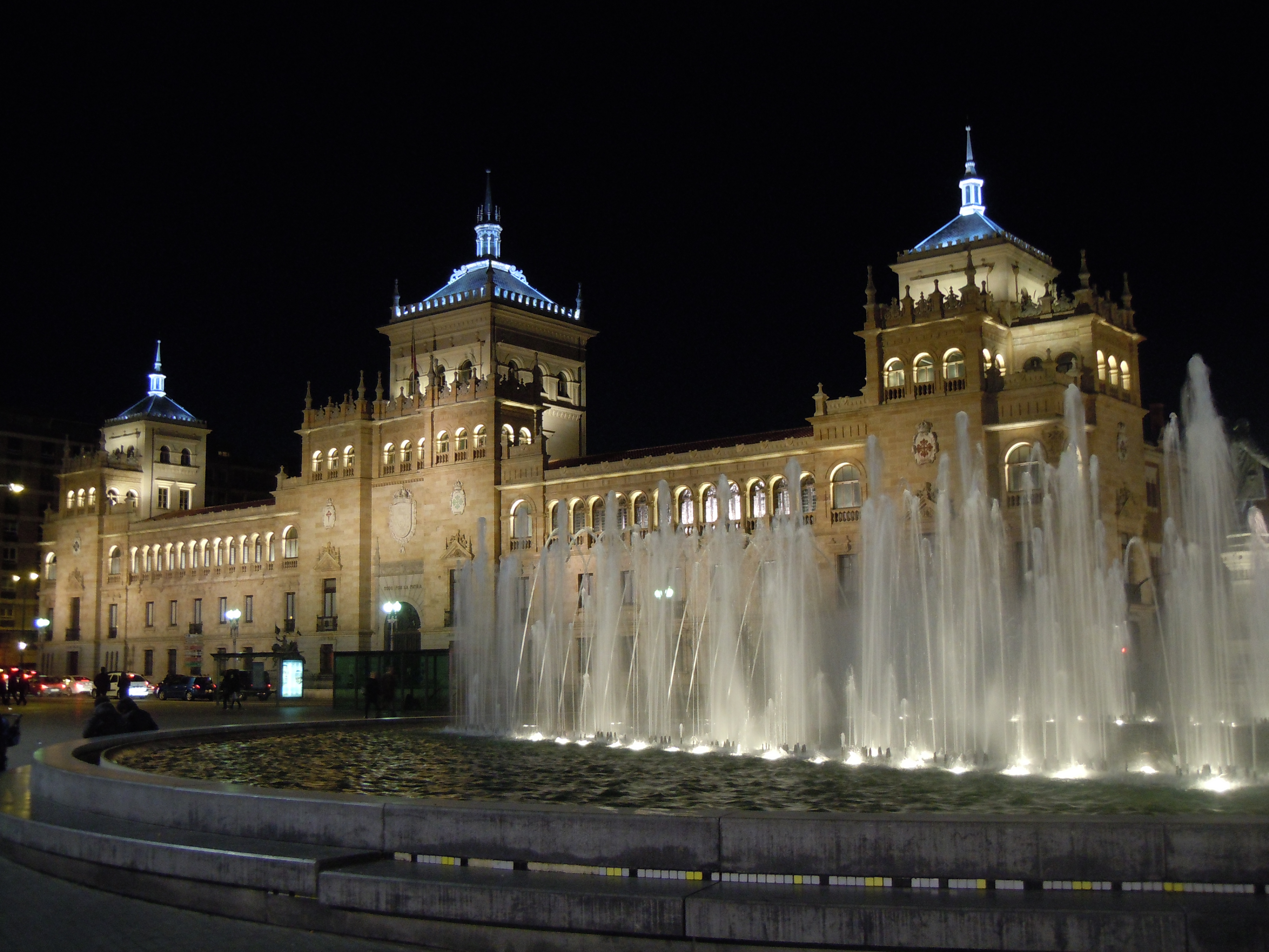 Academia del Arma de Caballería y Plaza de Zorrilla, Valladolid (Spain).